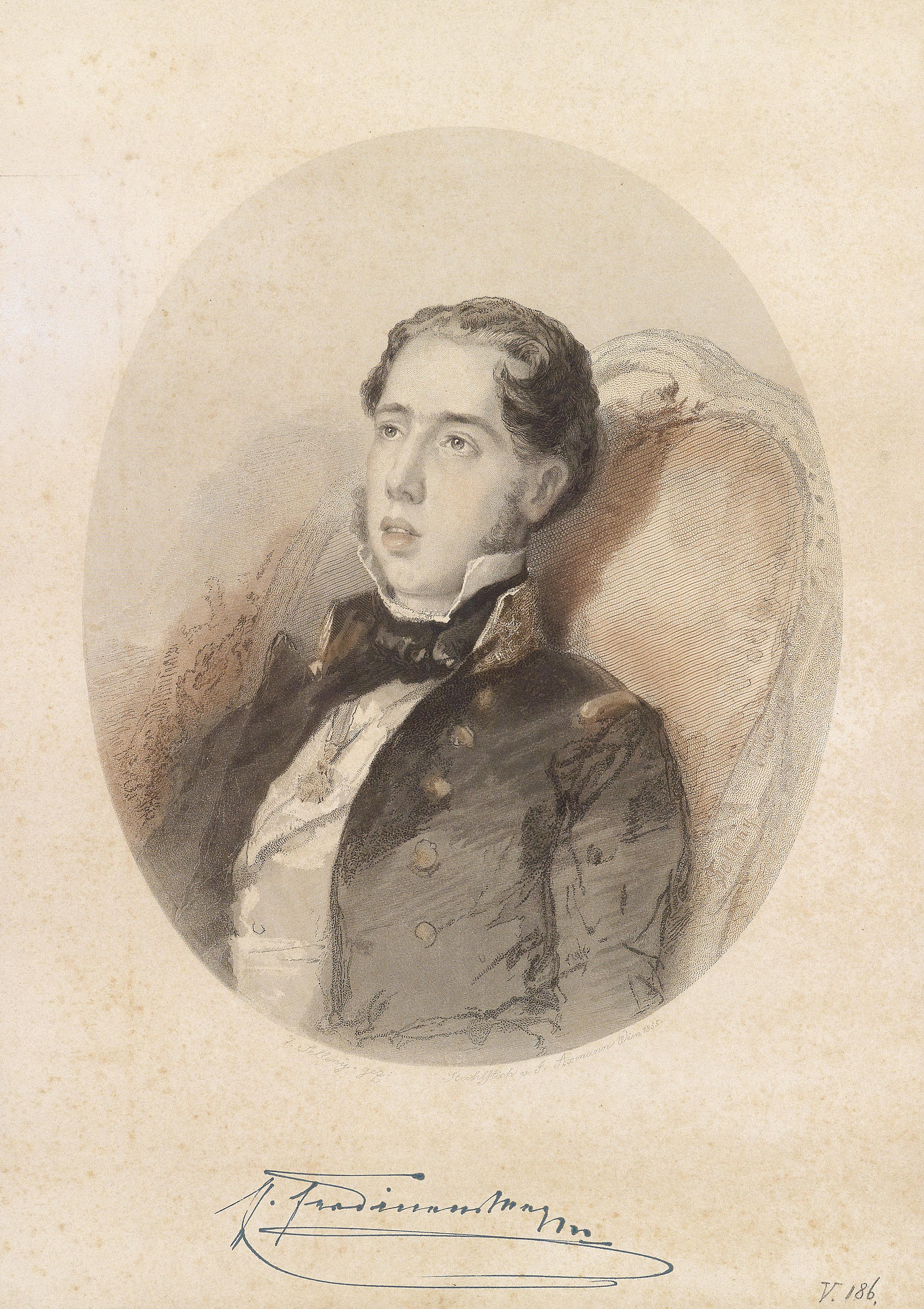 (später Maximilian von Mexiko)